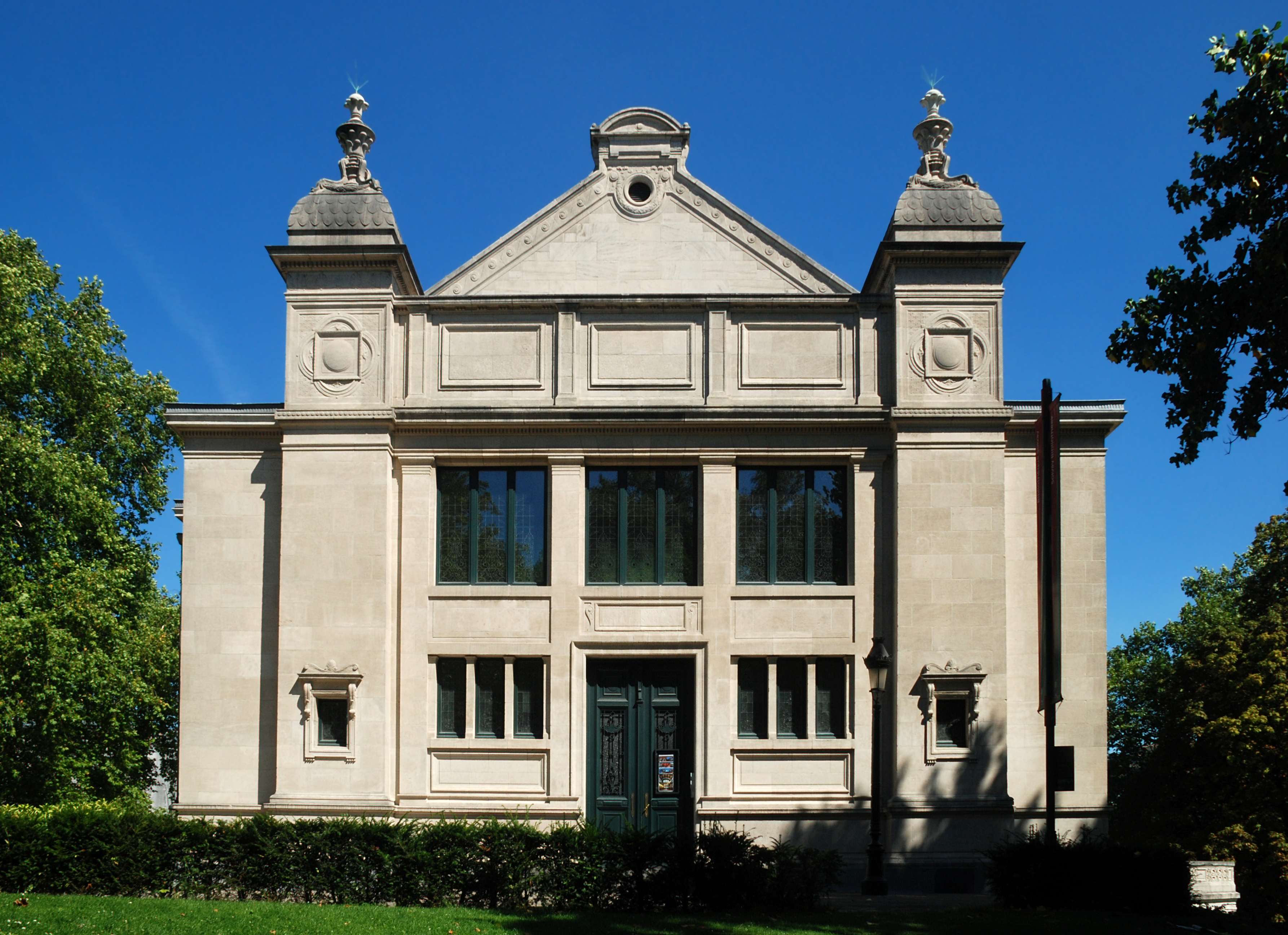 Belgique - Bruxelles - Bibliothèque Solvay